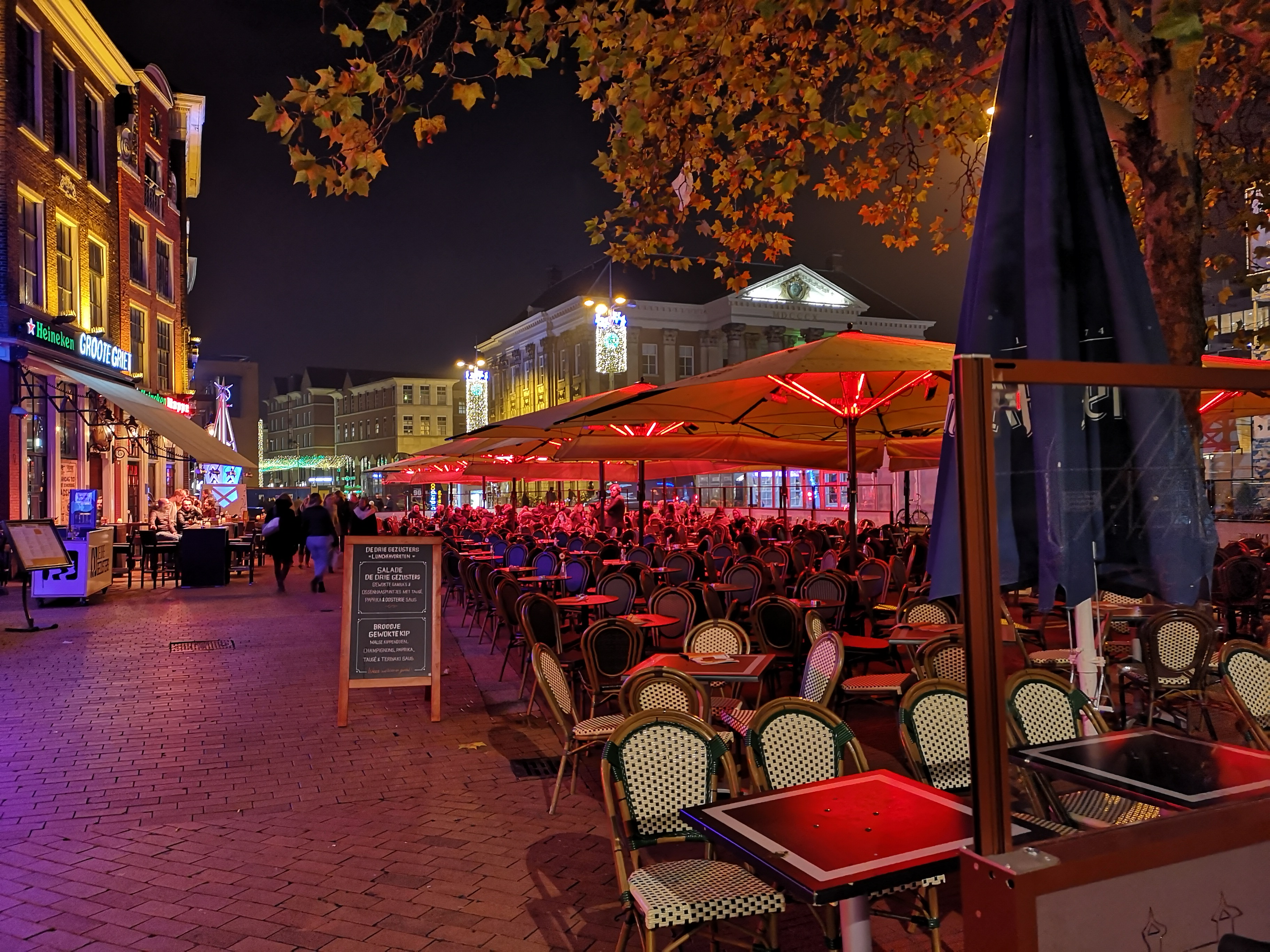 Terras voor de Drie Gezusters op de Grote Markt bij avond